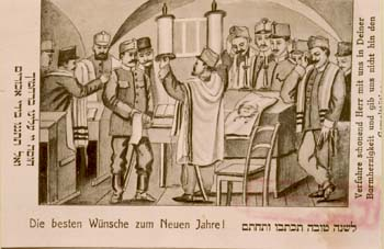 Jewish Soldiers Prayer in Simchat Torah WW1